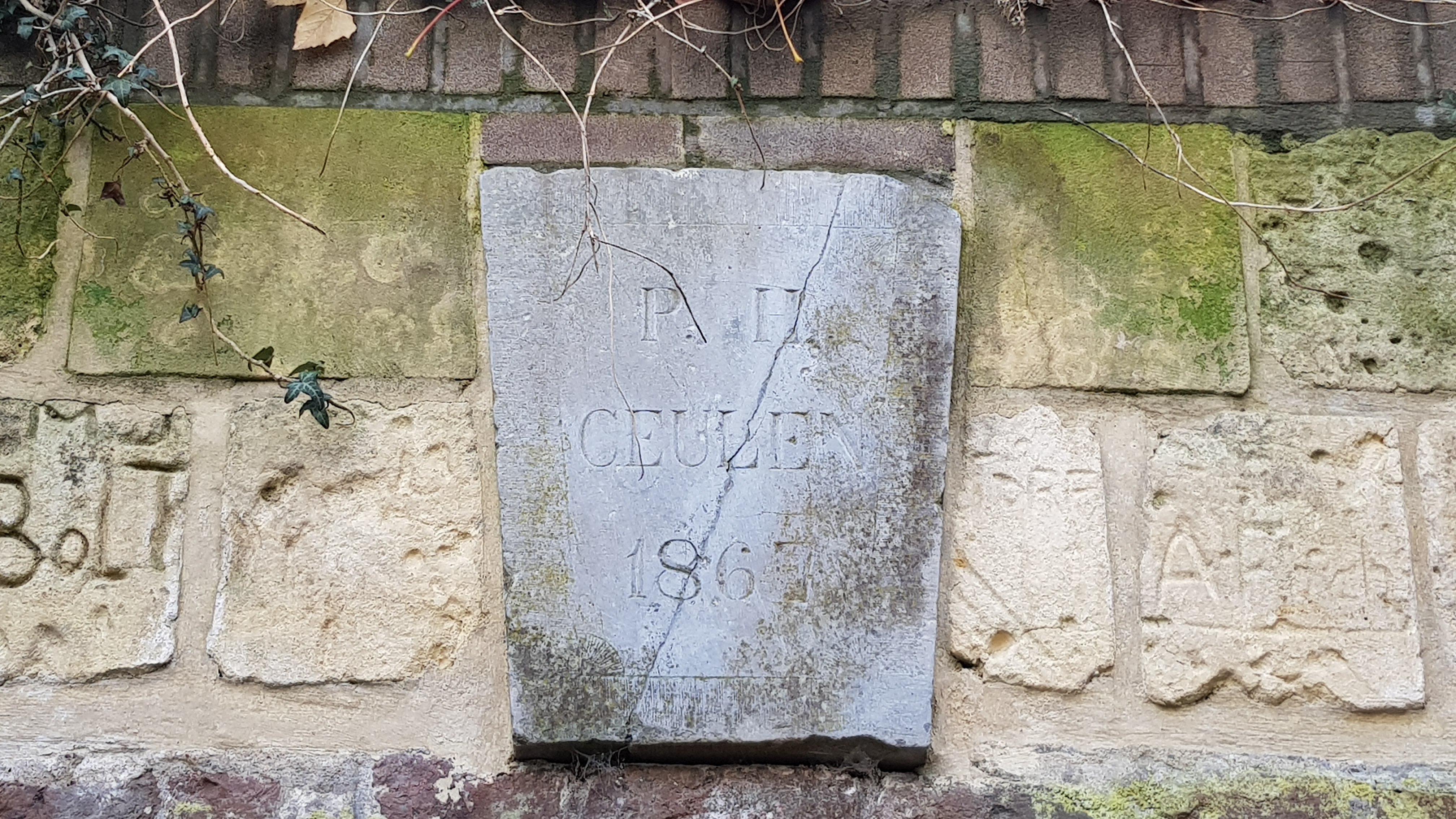 ingang gangenstelsel Ceulen van het Noordelijk Gangenstelsel, Sint-Pietersberg, Maastricht, Nederland